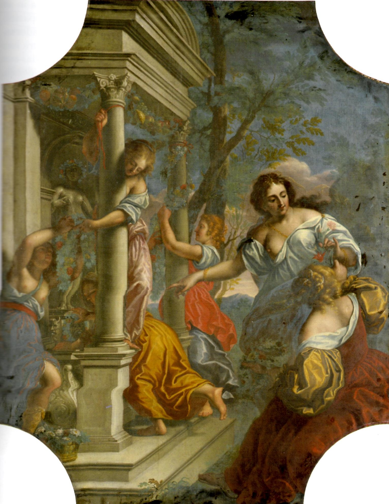 Tempio di Veneretitle QS:P1476,it:"Tempio di Venere" label QS:Lit,"Tempio di Venere"